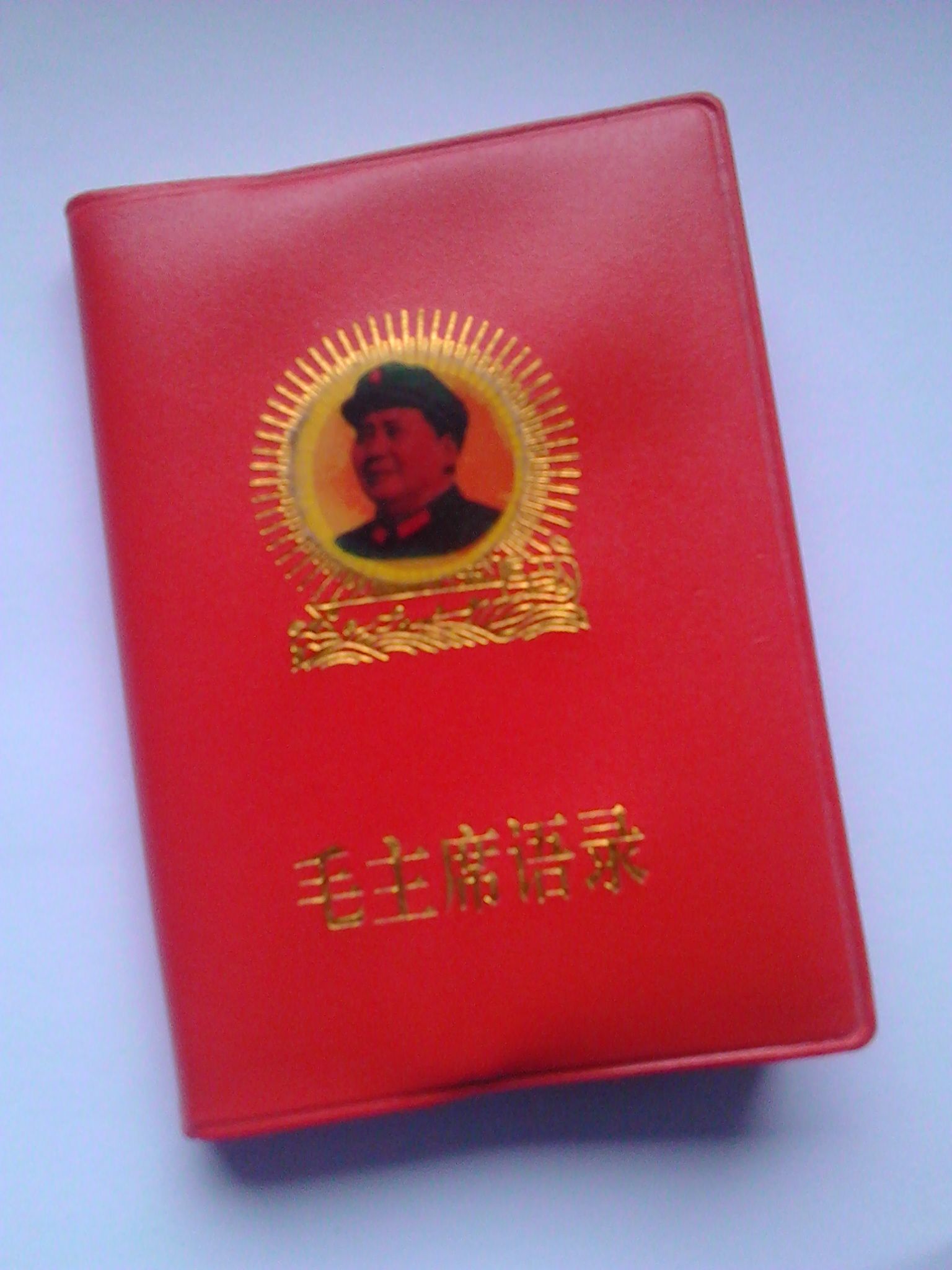 Un Libretto rosso ristampato per i turisti, acquistato in Cina in un mercato nel 2013 (n. di pagine: 270 + 8 con n. di fotografie di Mao a colori contenute: 16).